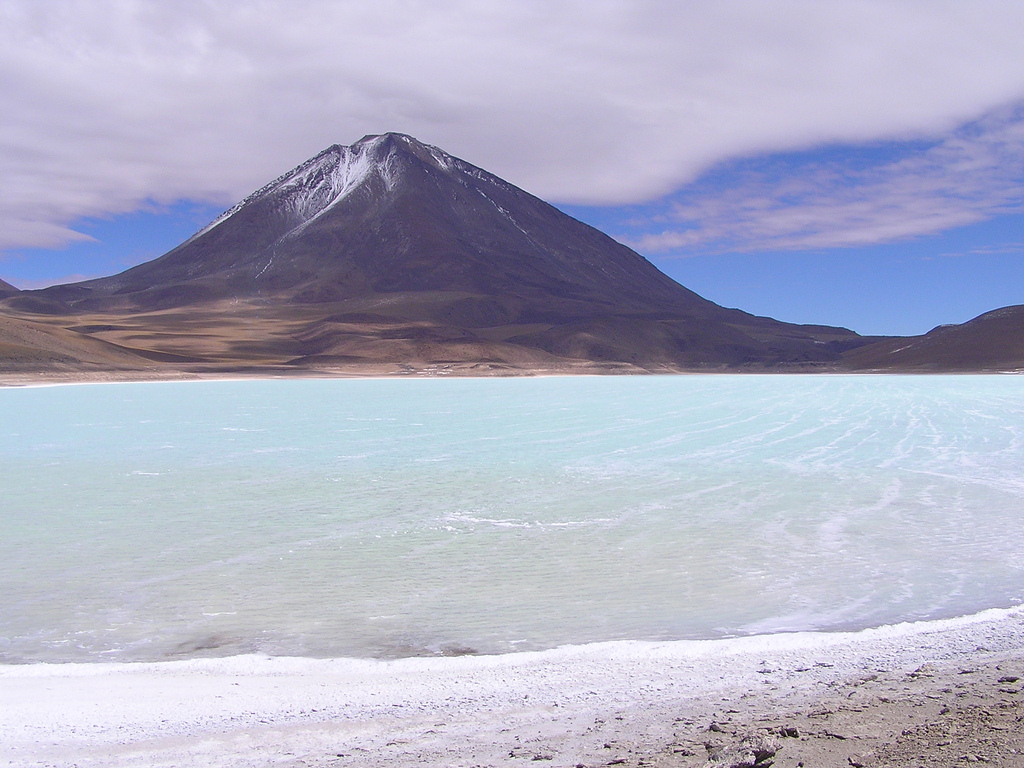 Зелената боја по која е добиено името.